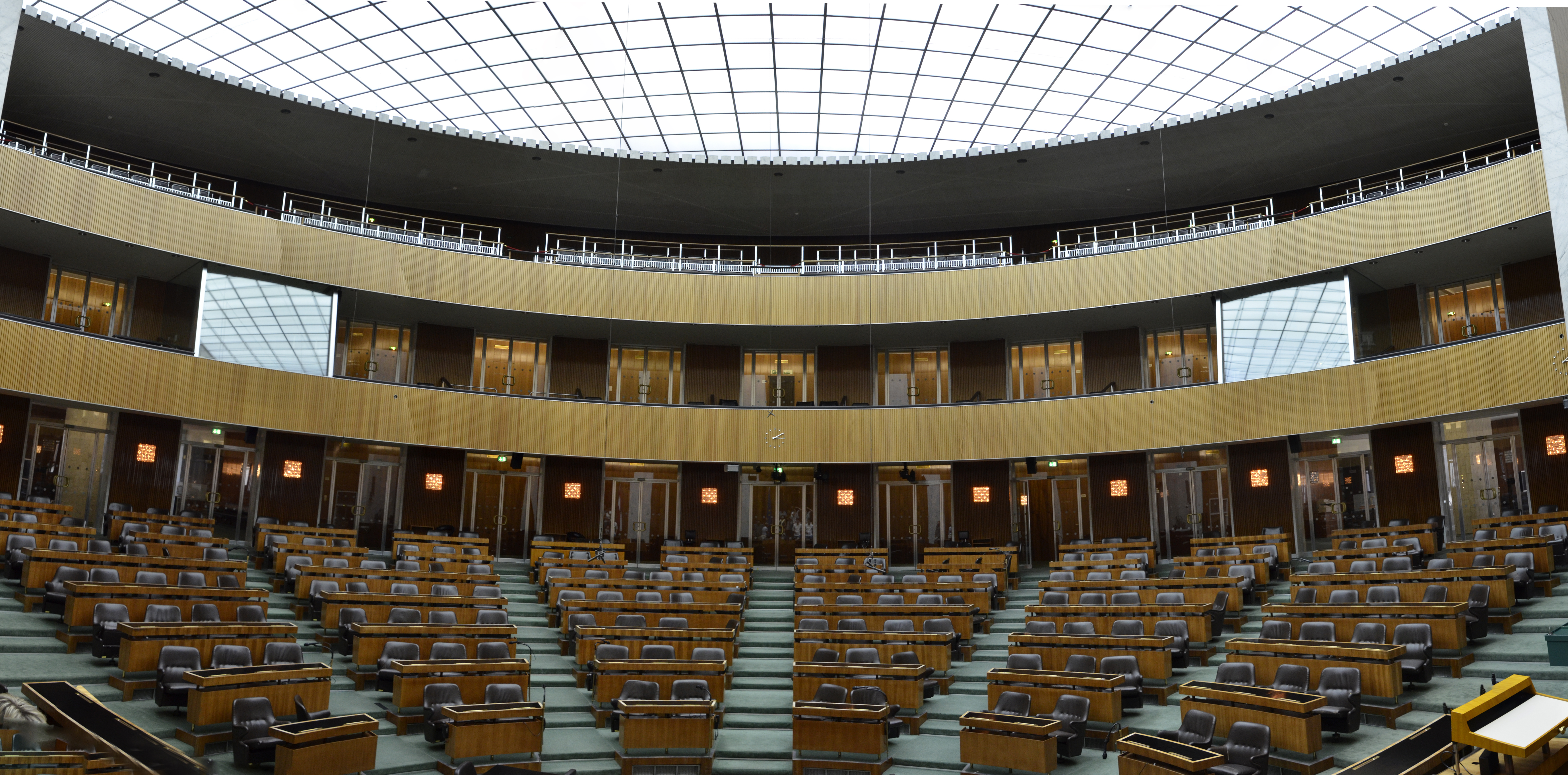 Der Nationalrat im Parlamentsgebäude in Wien.